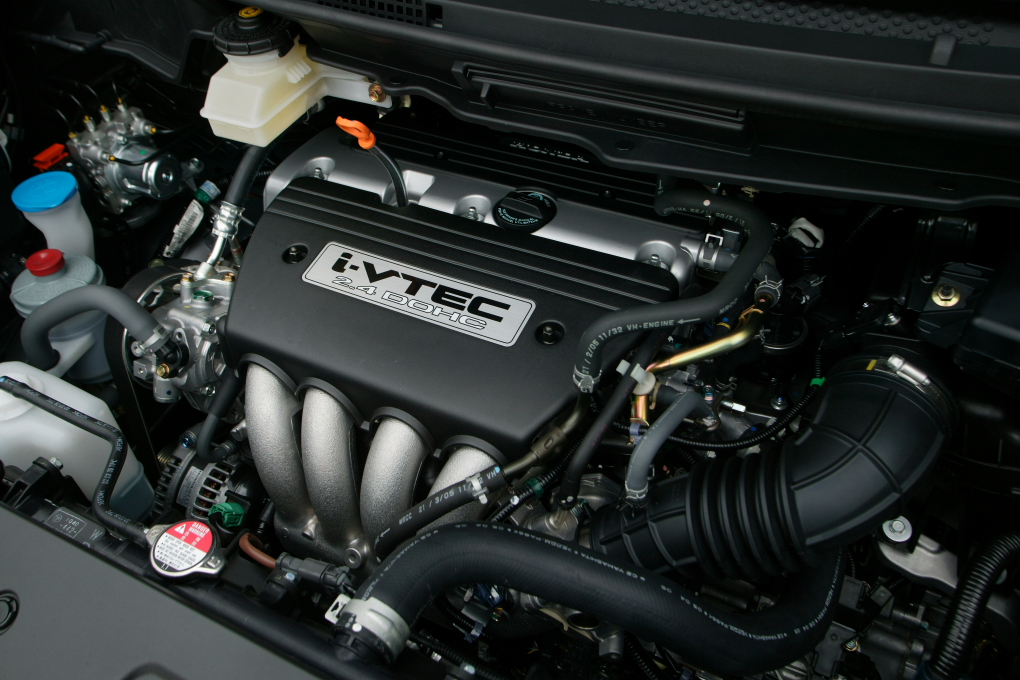 Honda K24A engine.